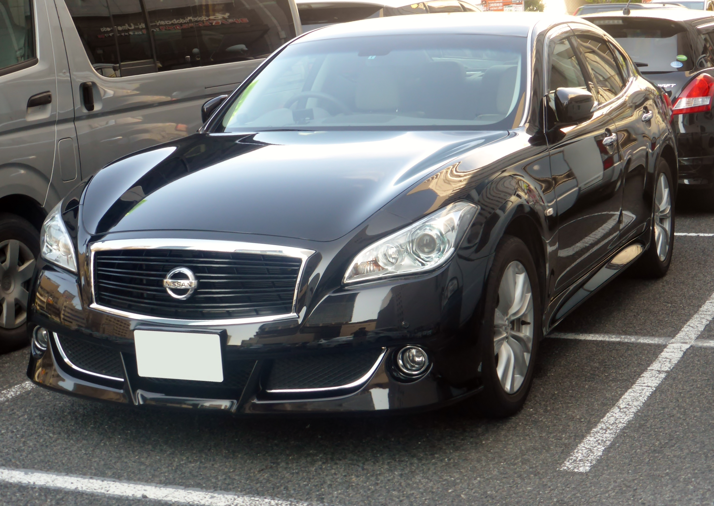 Y51型日産・フーガ250GTをフロントから撮影。